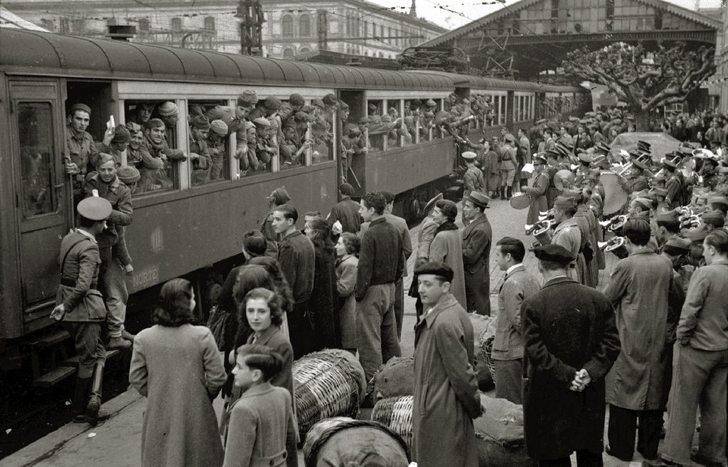 Título original: Despedida a los soldados integrantes de la División Azul tras una comida en el patio del Hospital Militar Mola antes de partir (14/20) Localización: San Sebastián (Guipúzcoa)